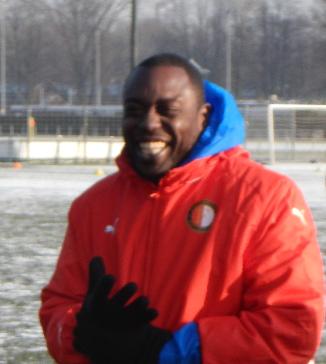 Ulrich van Gobbel tijdens een voetbalclinic op Varkenoord in Rotterdam